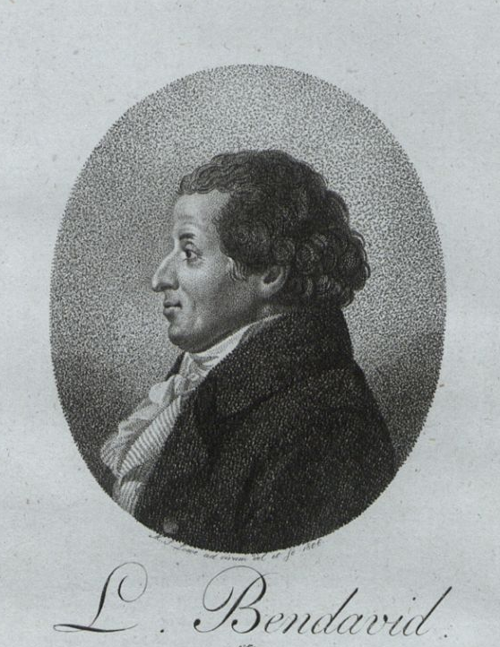 Lazarus Bendavid. Von M. S. Lowe nach dem lebenden Vorbild gezeichnet und gestochen 1806 ("ad vivum del[ineavit] et sc[ulpsit]"). Aus: Lazarus Bendavid [Selbstbiografie], in: Bildnisse jetztlebender Berliner Gelehrten mit Ihren Selbstbiographieen. Berlin: Starcke / Leipzig: J. G. Mittler 1806